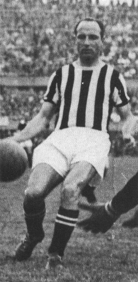 Il calciatore italiano Alberto Bertuccelli in azione alla Juventus tra gli anni 40 e 50 del XX secolo.